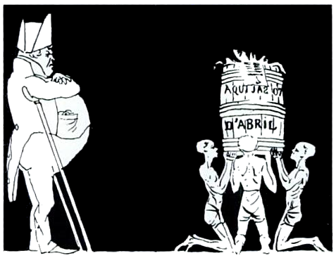 Caricatura publicada no Brasil pela litografia de Frederico Guilherme Briggs, mostra Bernardo Pereira de Vasconcelos enterrando as conquistas liberais obtidas com a abdicação de D. Pedro I, em 7 de abril de 1831.